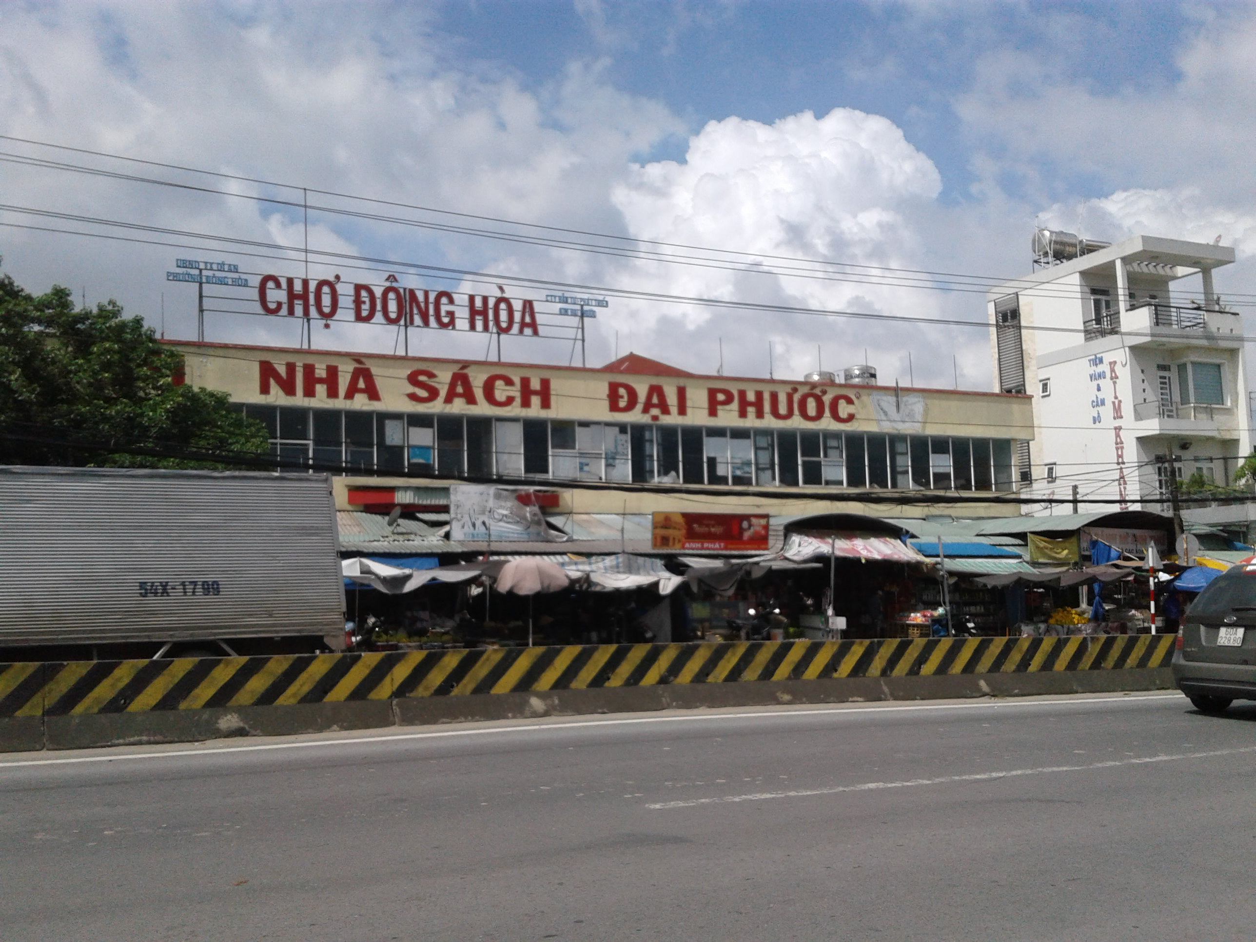 Chợ Đông Hòa, Thuận An, Bình Dương